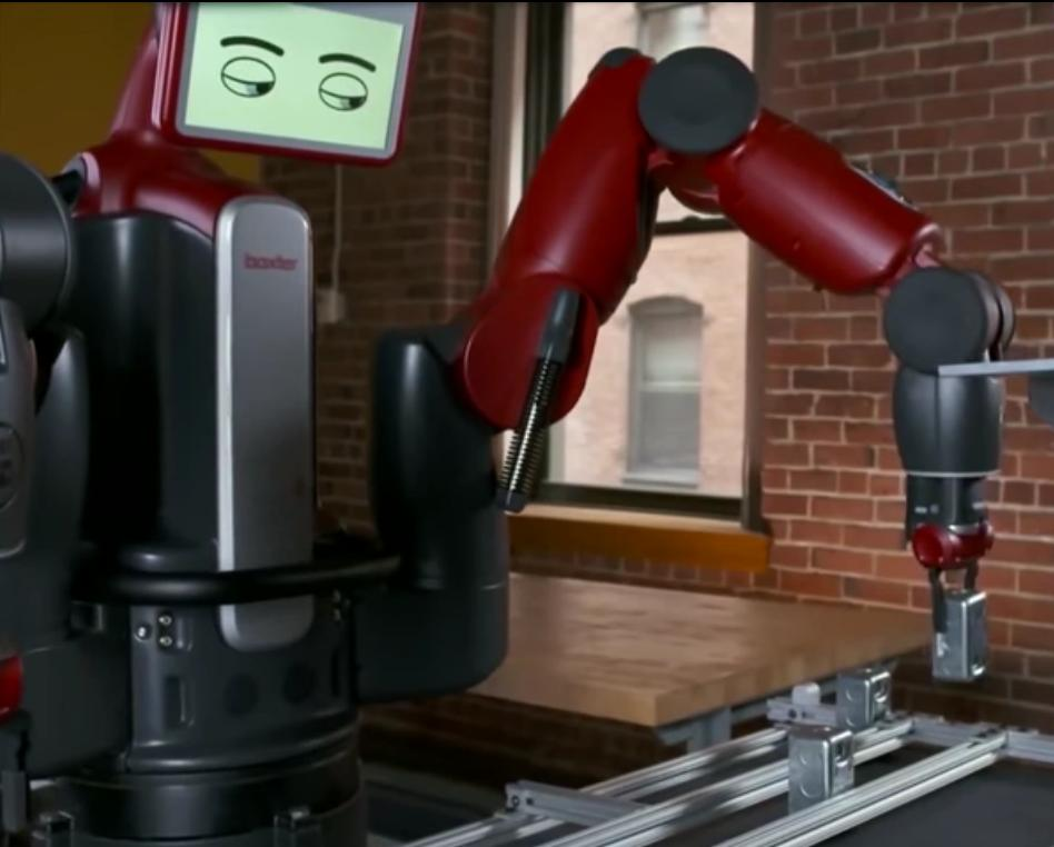 Baxter travail